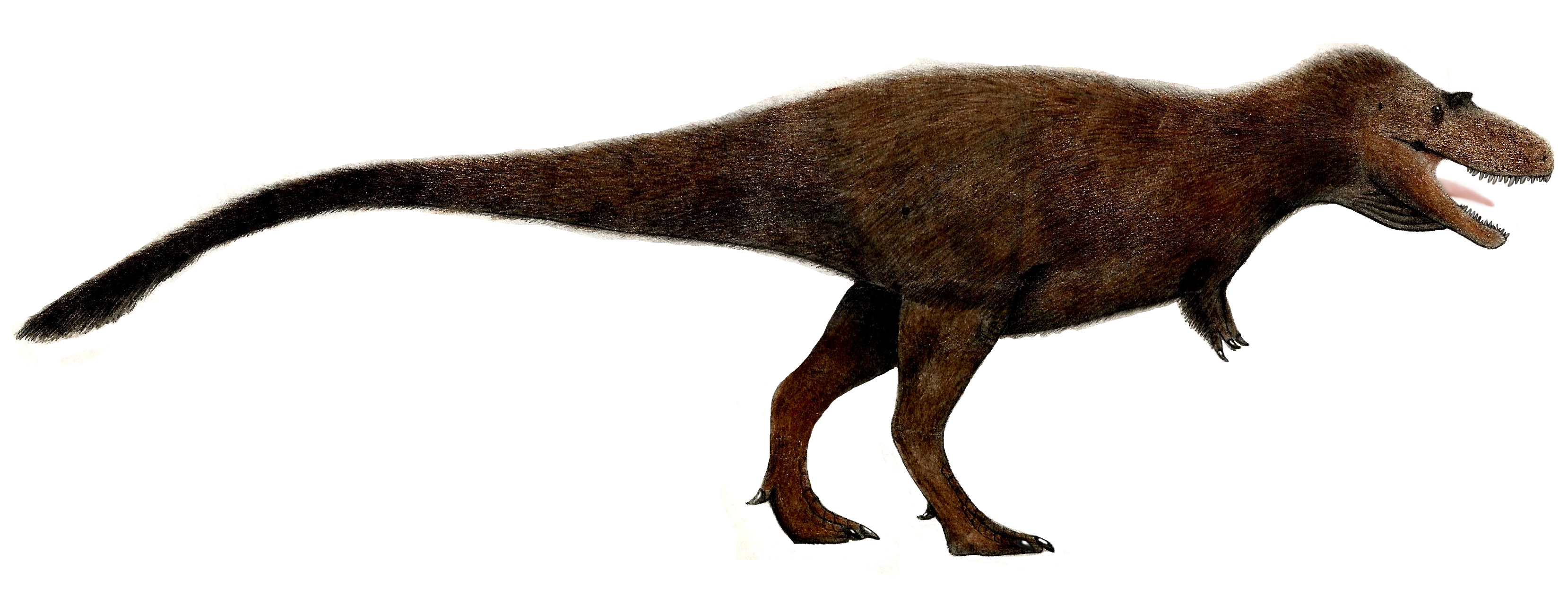 Recreación de Gorgosaurus libratus